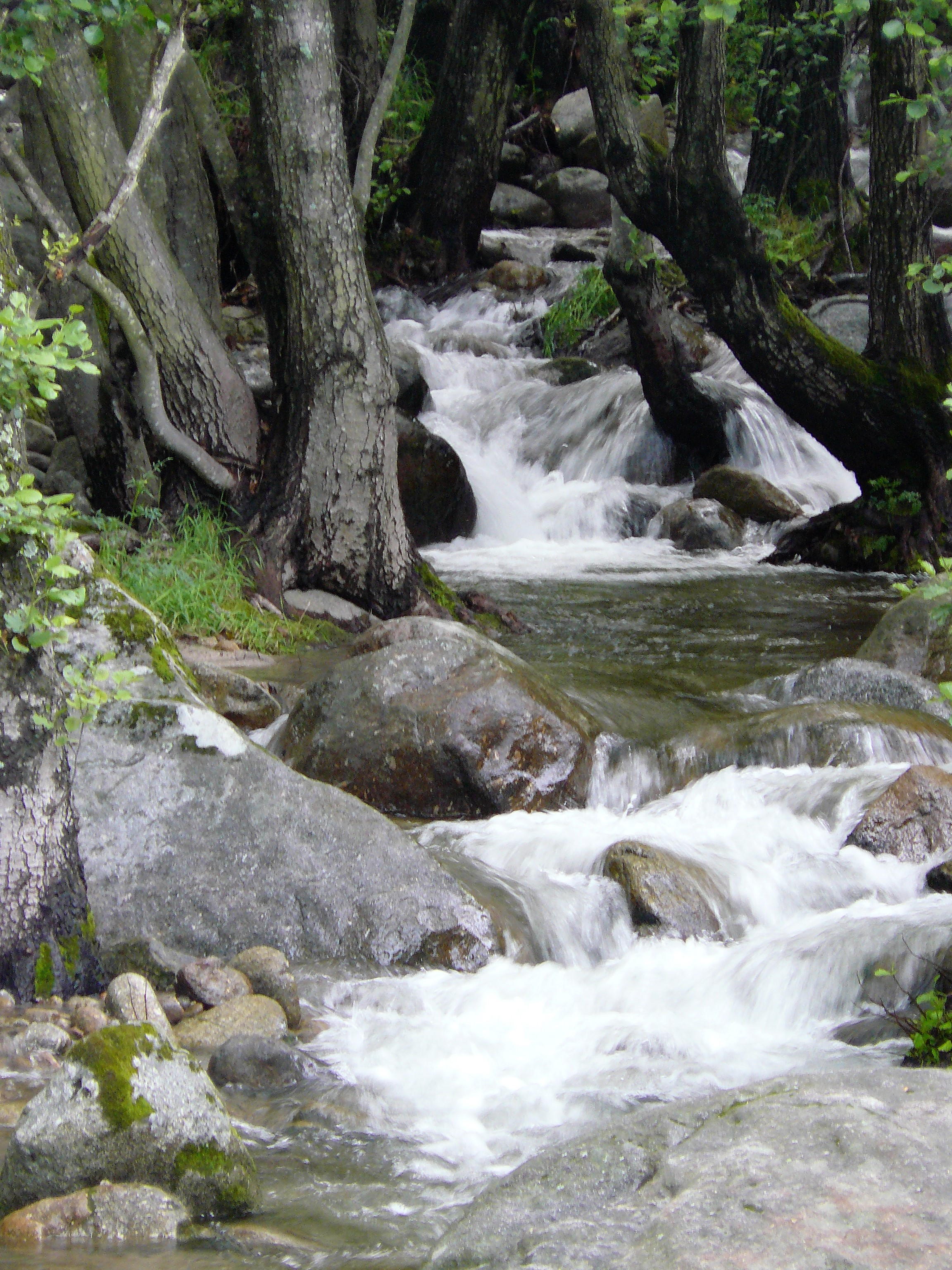 Sierra de Gredos This is a photography of a Special Area of Conservation in Spain with the ID: ES4110002. Natura2000 entry, EEA entry